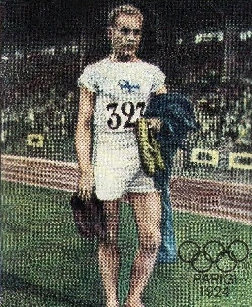 Paavo Nurmi (Paris 1924) - Campioni dello Sport 1968-1969, n°427